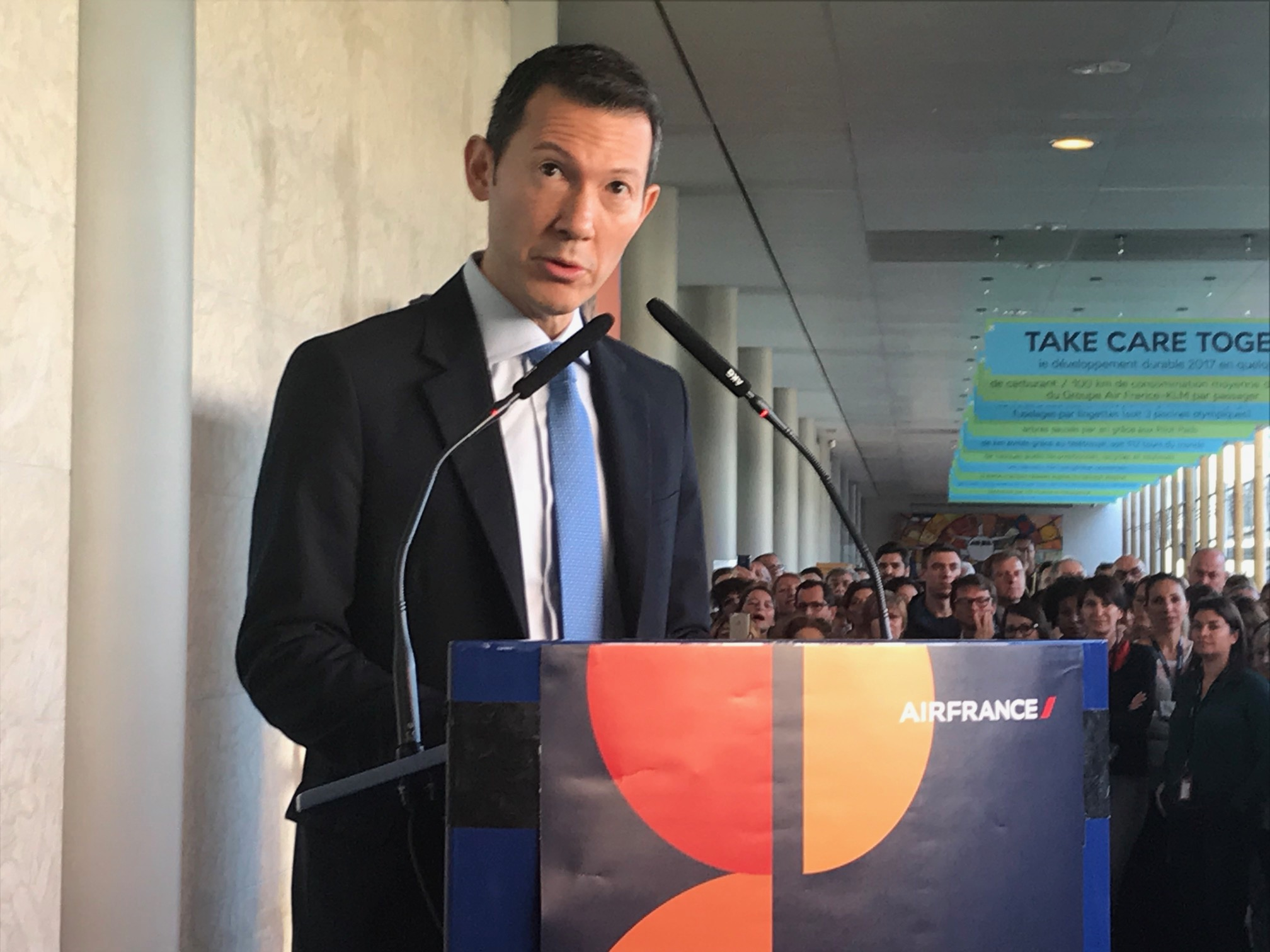 Benjamin Smith durant la célébration des 85 ans d'Air France